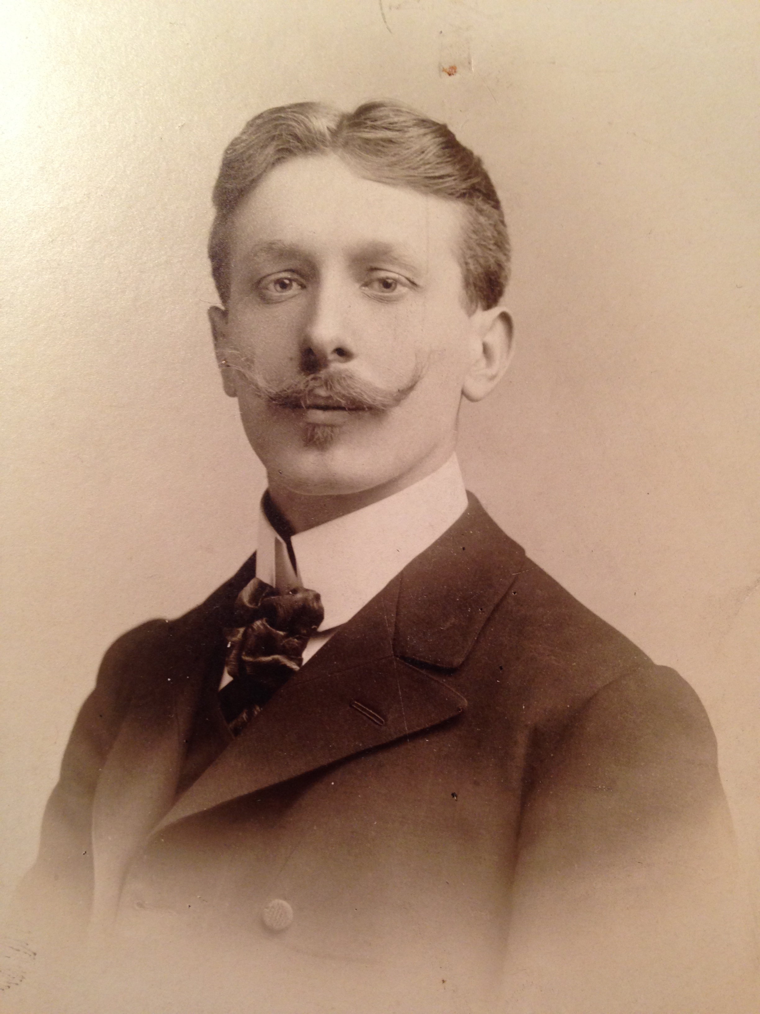 Gaston Blanquart est un flûtiste et pédagogue français, né à Raismes (Nord) le 2 juin 1877 et mort à Clichy le 1er décembre 1962